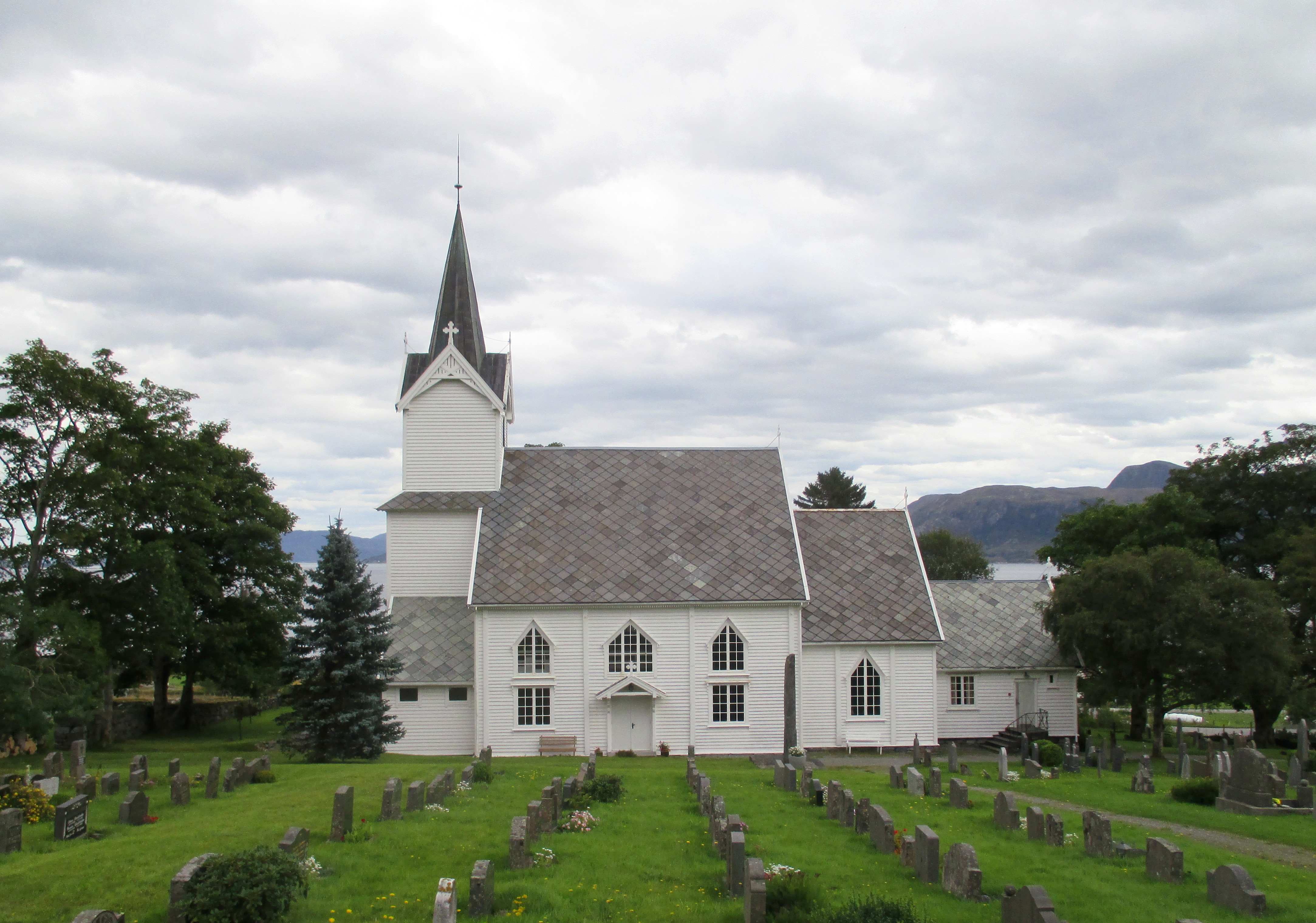 Leikanger kirke i Selje